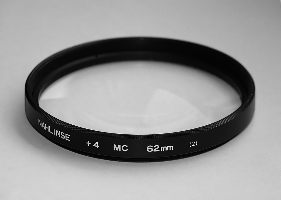 Beschreibung: Nahlinse mit +4 Dioptrien / Filterdurchmesser 62 mm Fotograf: Darkone, 2. April 2006